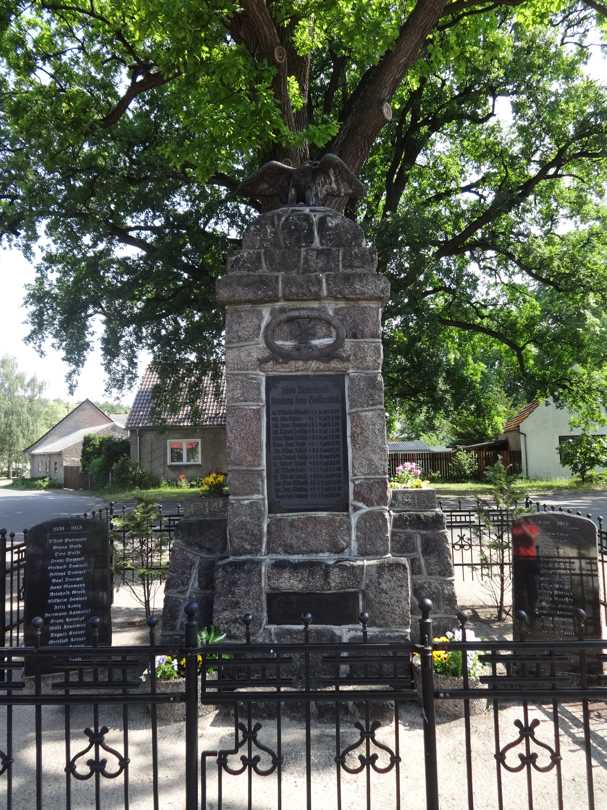 Denkmal für die Gefallenen der Weltkriege am Dorfplatz in Neuendorf am See, Brandenburg